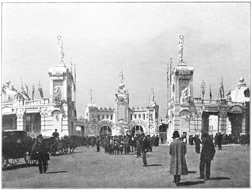 "De hoofdingang van de tentoonstelling te Milaan"